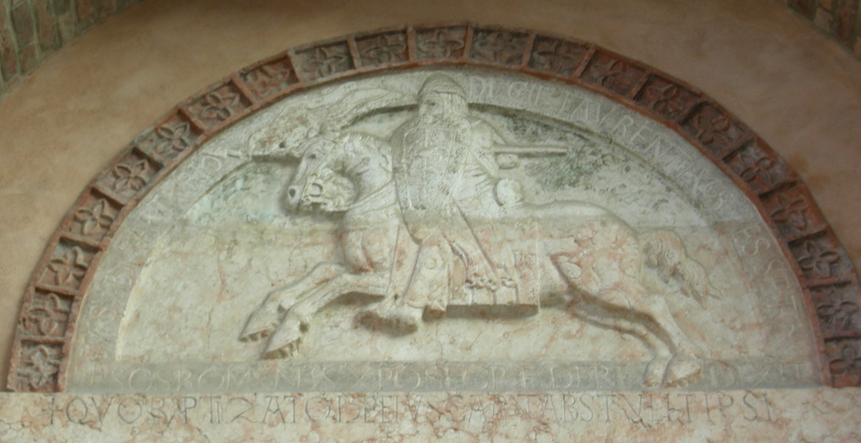 Nicholaus e bottega, San Romano, timpano chiesa di San Romano, 1143, Ferrara